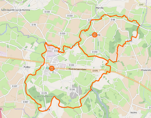 Carte de la commune nouvelle et de ses communes déléguées